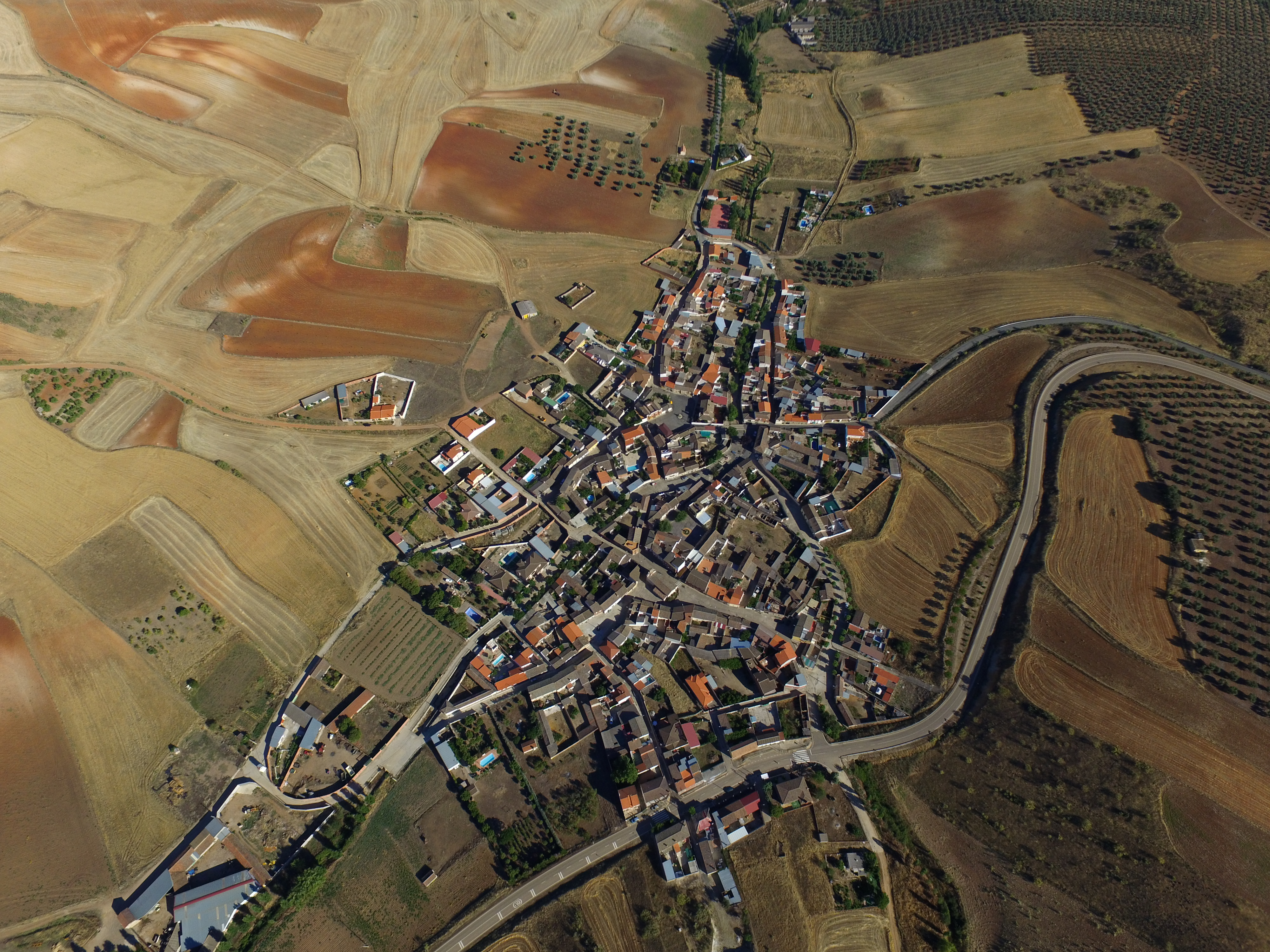 Foto aérea de Retamoso de la Jara. Julio de 2017.